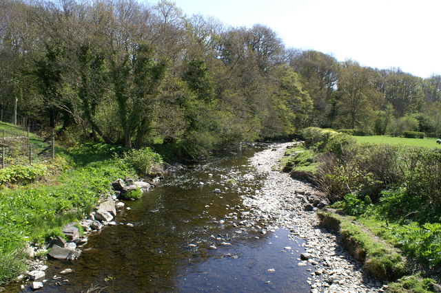 Afon Carno